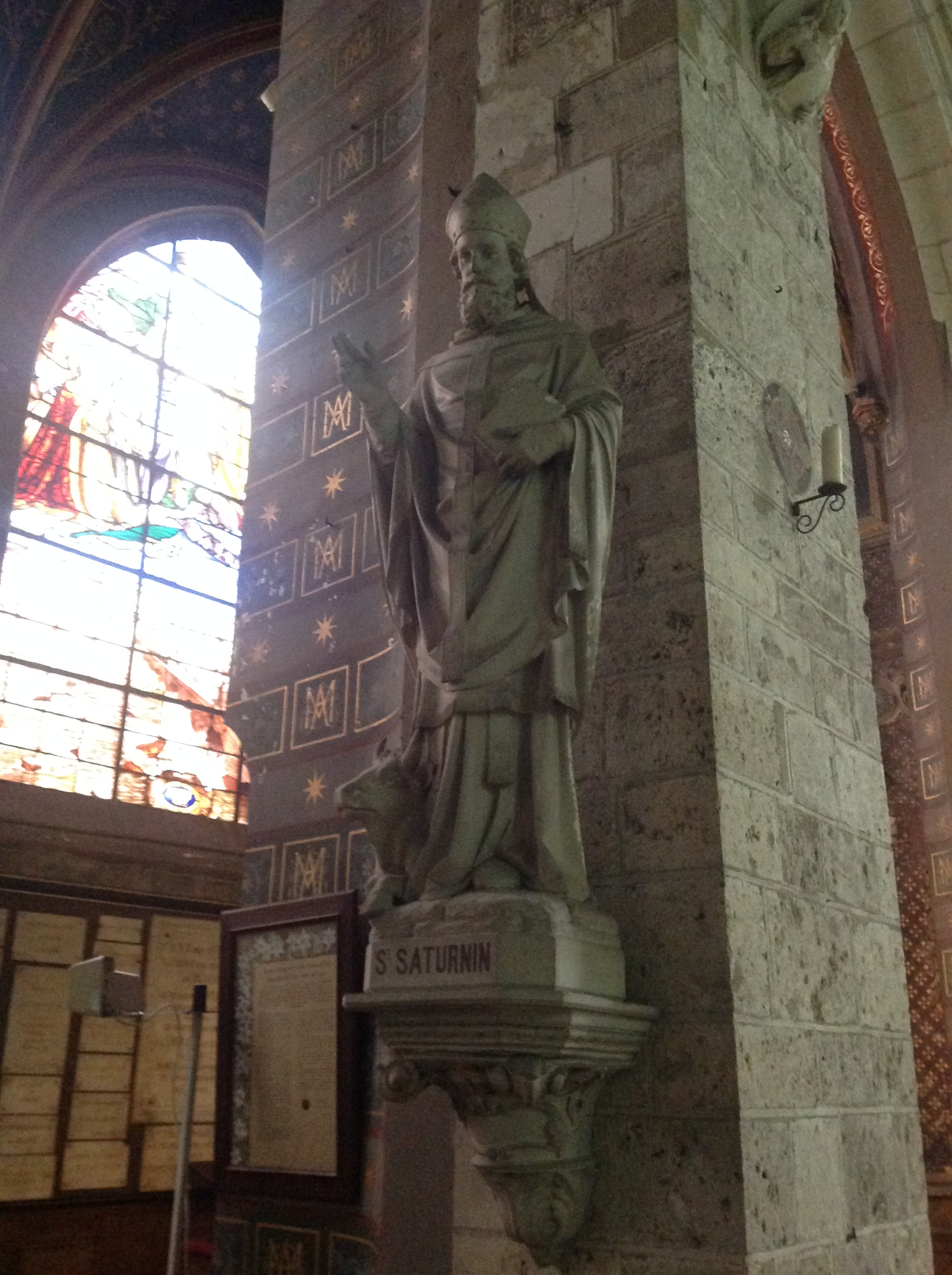 Statue de Saint Saturnin, premier évêque chrétien de Toulouse